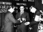 Premio de la industria lechera al Queso Provolone Hilado marca Provoleta